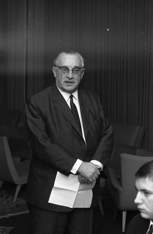 Sts. Seifriz empf. Bundes-u. Landessieger in den Leistungswettbewerben des Handwerks. (Landesvertretung Baden-Württemberg)